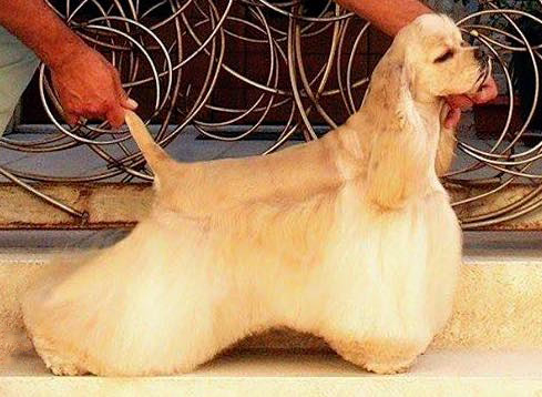 Cocker Américain